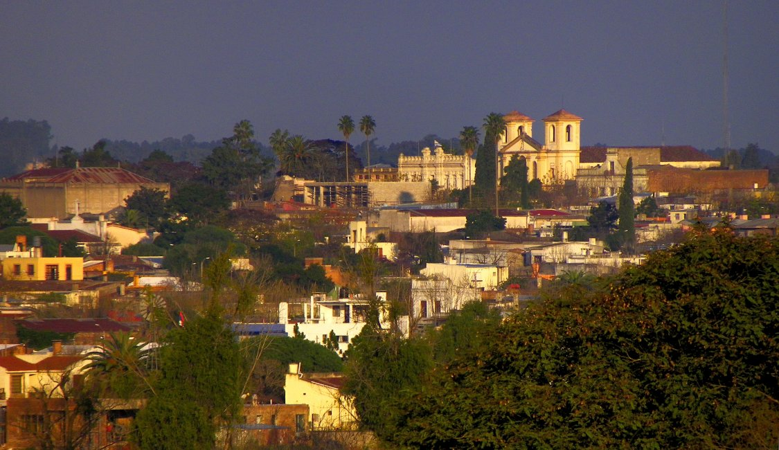 Iglesia Catedral de Nuestra Señora del Pilar.. Ubicada en el departamento de Cerro Largo